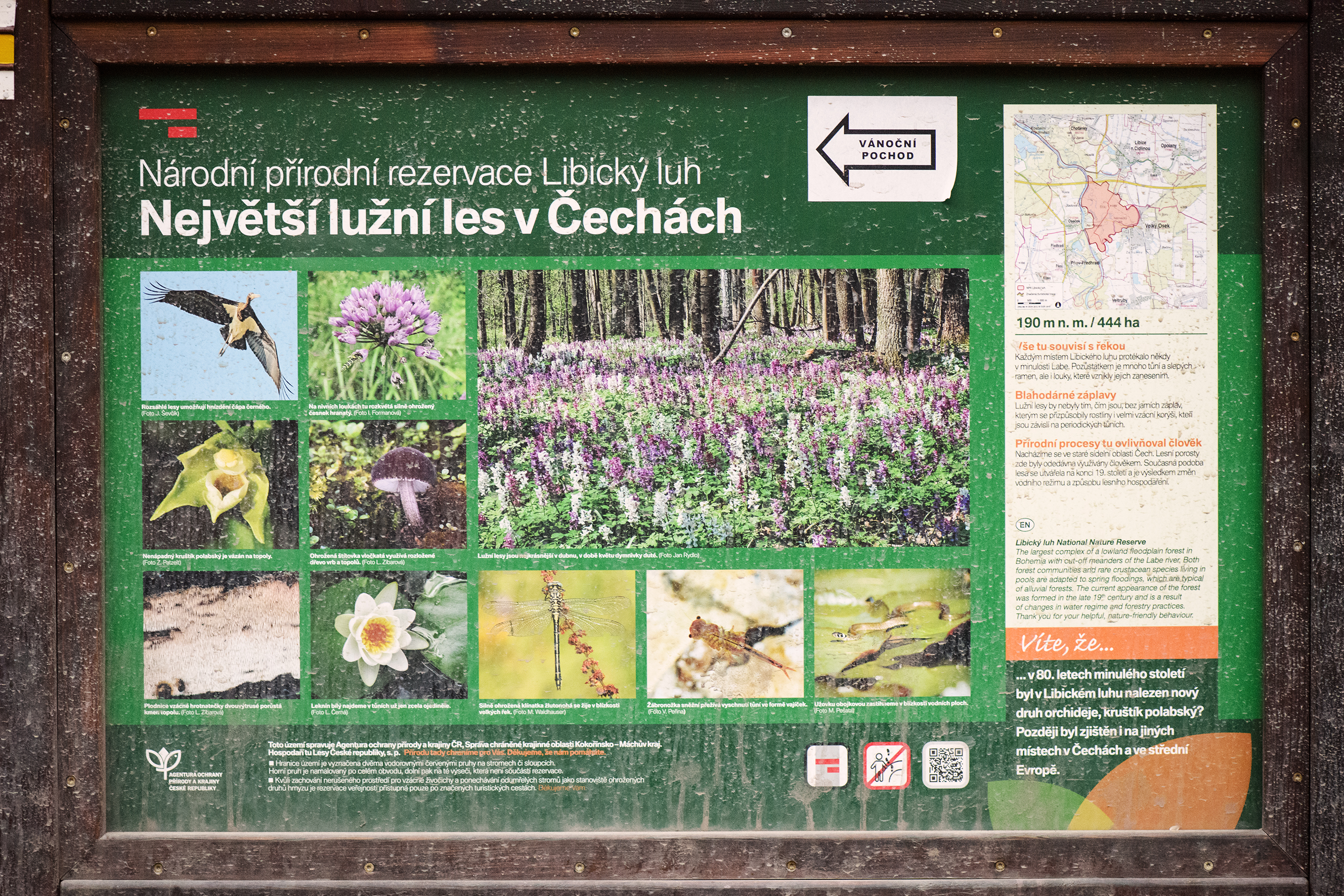 cedule - Libický luh